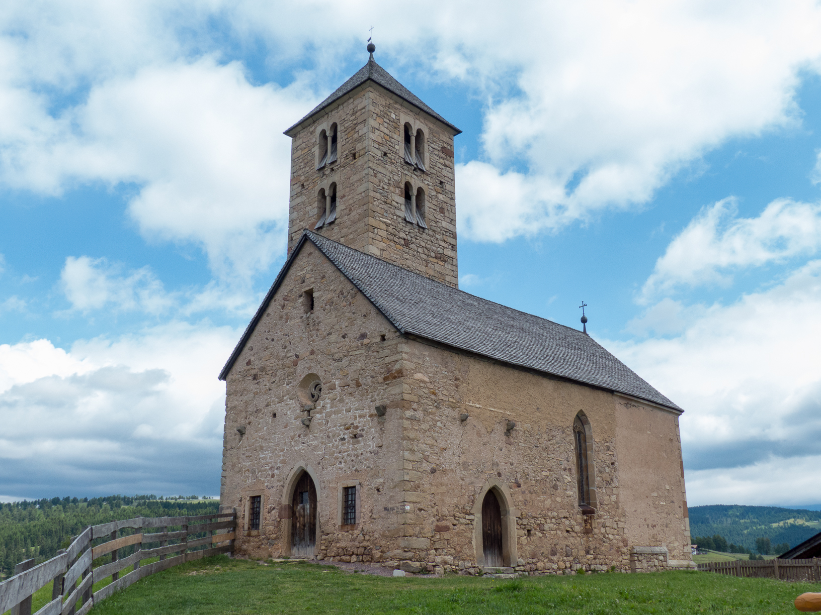 St. Jakob auf Langfenn, 12. Jhd., zwischen Meran und Bozen, Südtirol, Italien